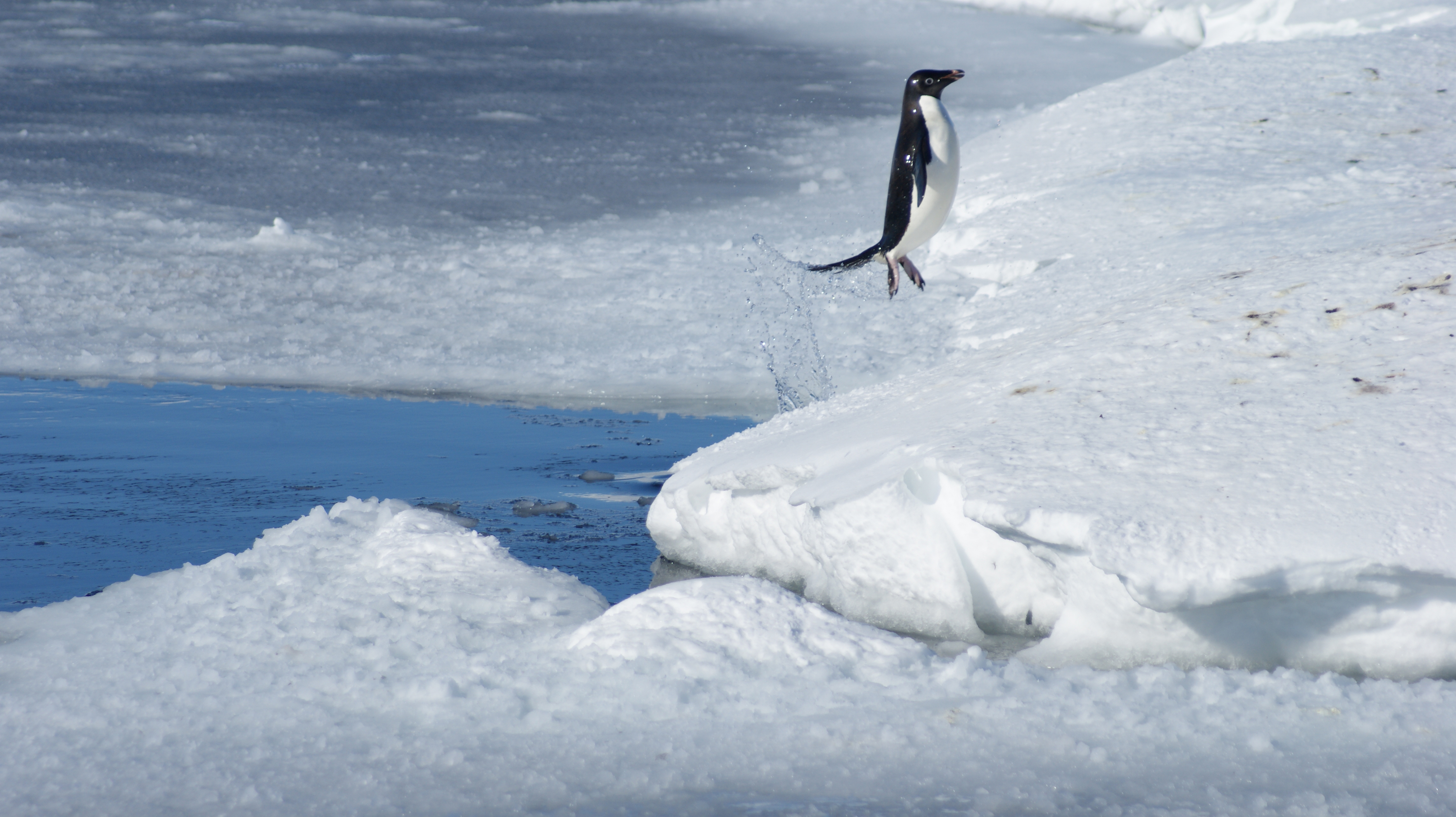 Sortie de l'eau d'un Adélie. Base Dumont d'Urville, Terre Adélie.